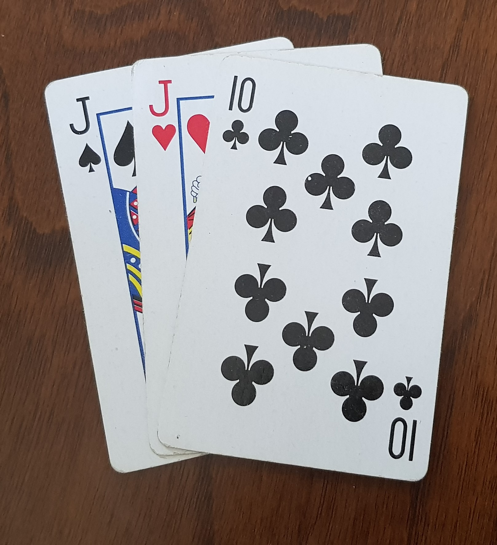 Chlust z 2 tych samych figur i dziesiątki żołądź, która zastępuje trzecią figurę.